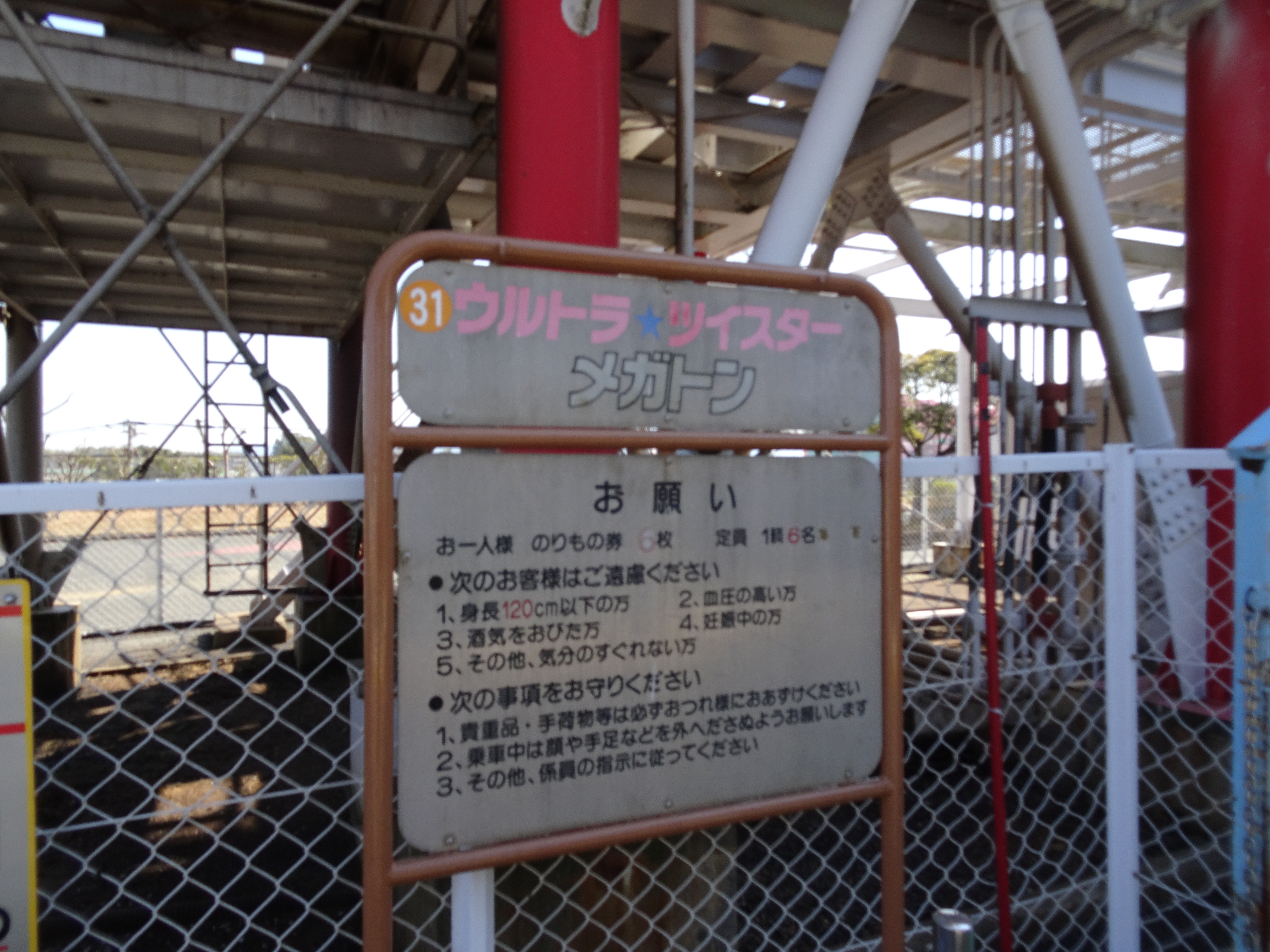 Greenland / グリーンランド